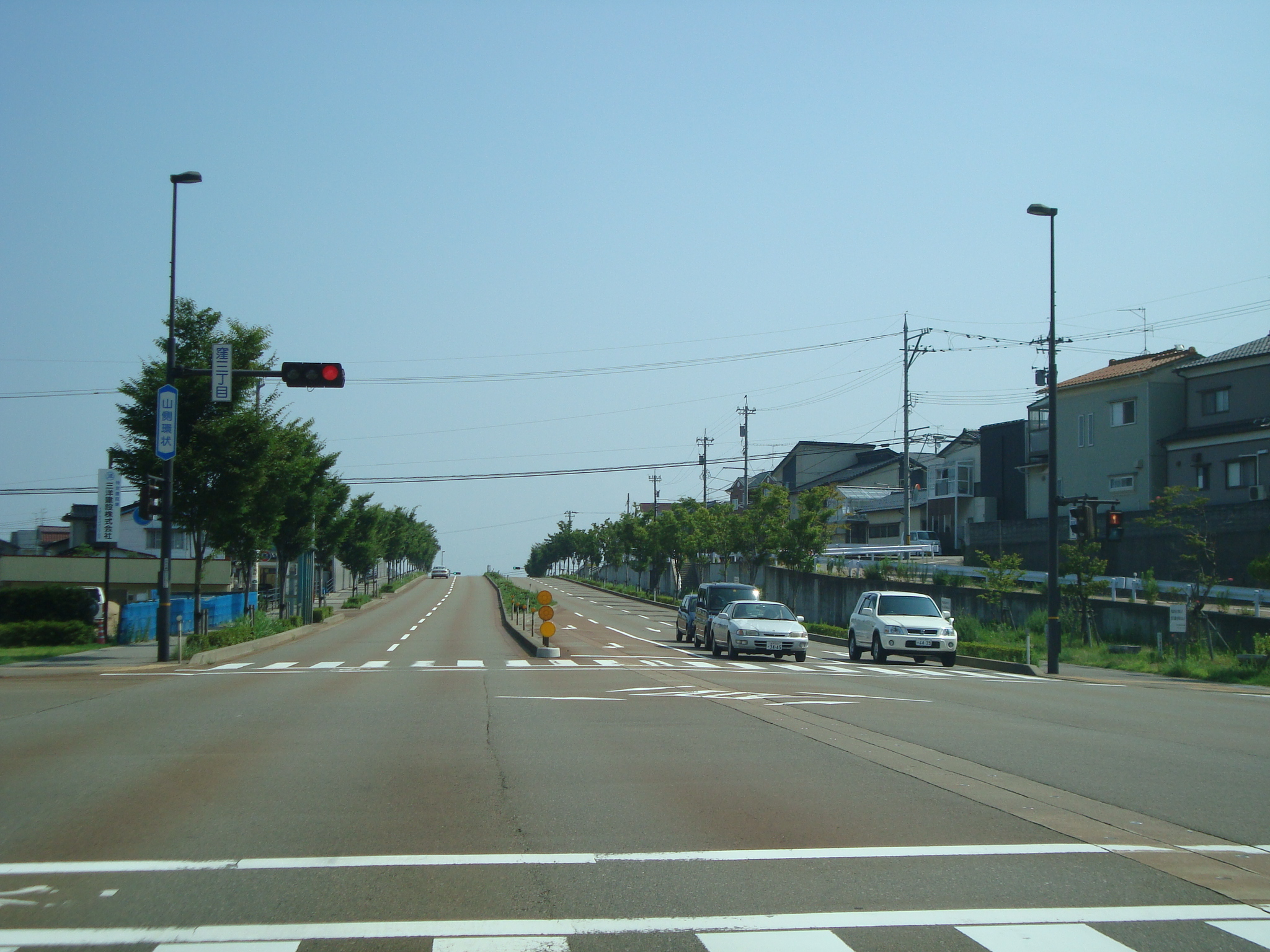 石川県道22号金沢小松線 金沢市窪3丁目付近